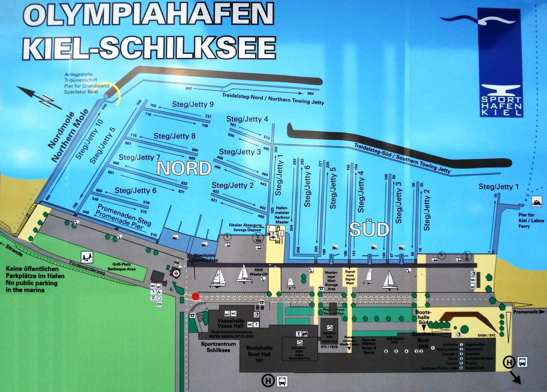 Karte des Olypiazentrums Kiel-Schilksee